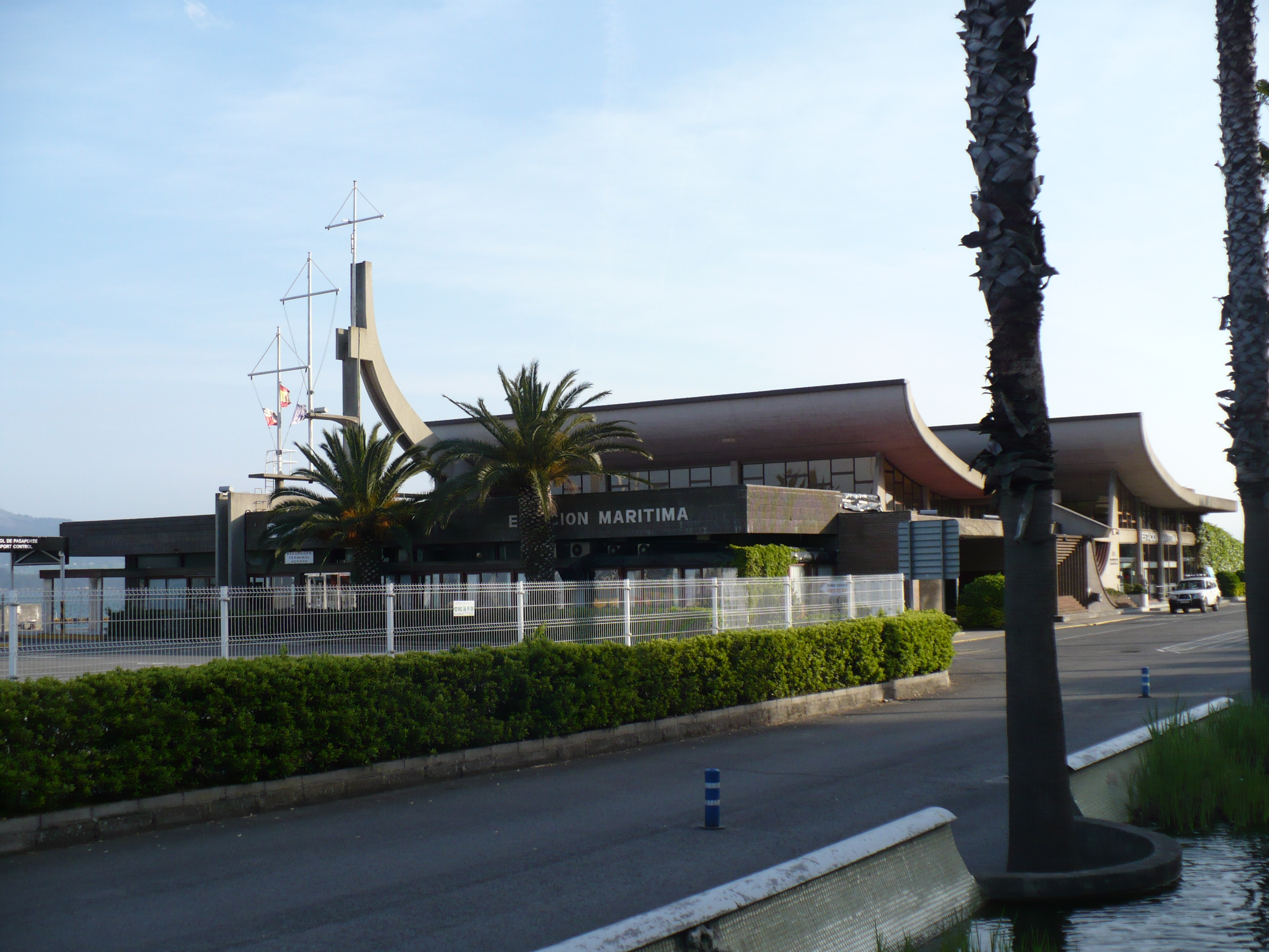 Estación Marítima de Santandé, terminal del ferry Santandé-Inglaterra Ferry terminal (Santander, Cantabria)